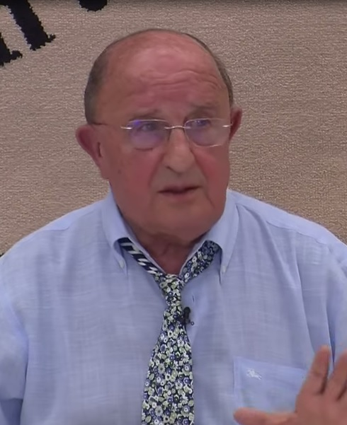 José Antonio Escudero López en 2014.